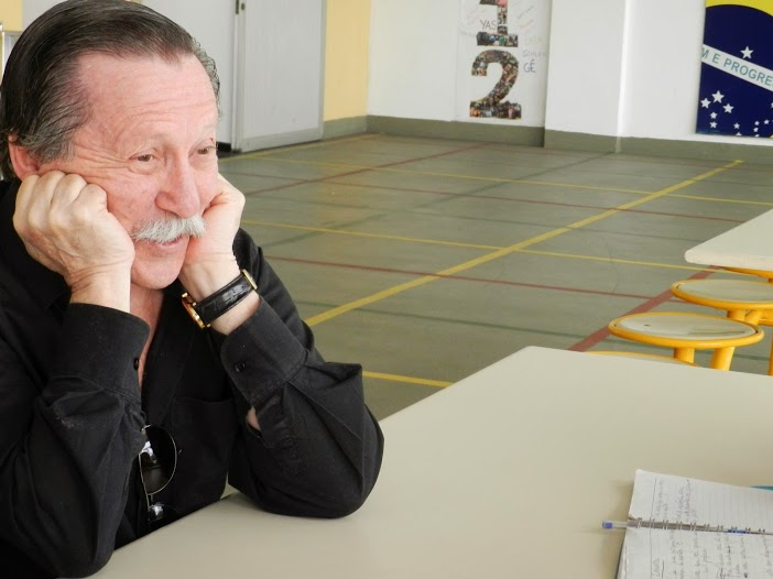 Escritor Pedro Bandeira (Feira do Livro do Colégio I. L. Peretz - 26/05/2013).